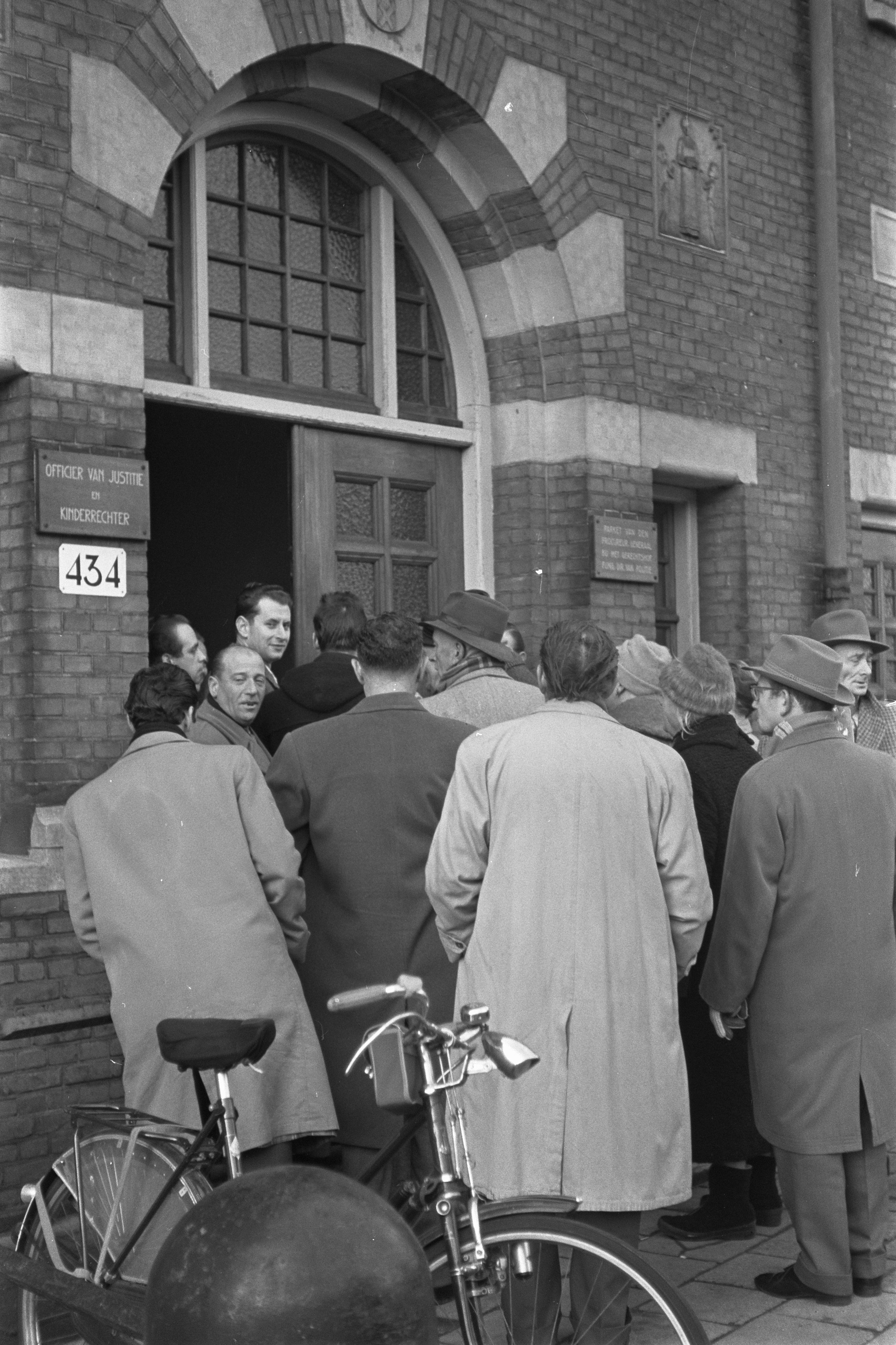 Collectie / Archief : Fotocollectie Anefo Reportage / Serie : [ onbekend ] Beschrijving : Rechtszaak "Magere Josje" publieke belangstelling Datum : 18 november 1959 Trefwoorden : Rechtszaken, belangstelling Fotograaf : Pot, Harry / Anefo Auteursrechthebbende : Nationaal Archief Materiaalsoort : Negatief (zwart/wit) Nummer archiefinventaris : bekijk toegang 2.24.01.05 Bestanddeelnummer : 910-8331